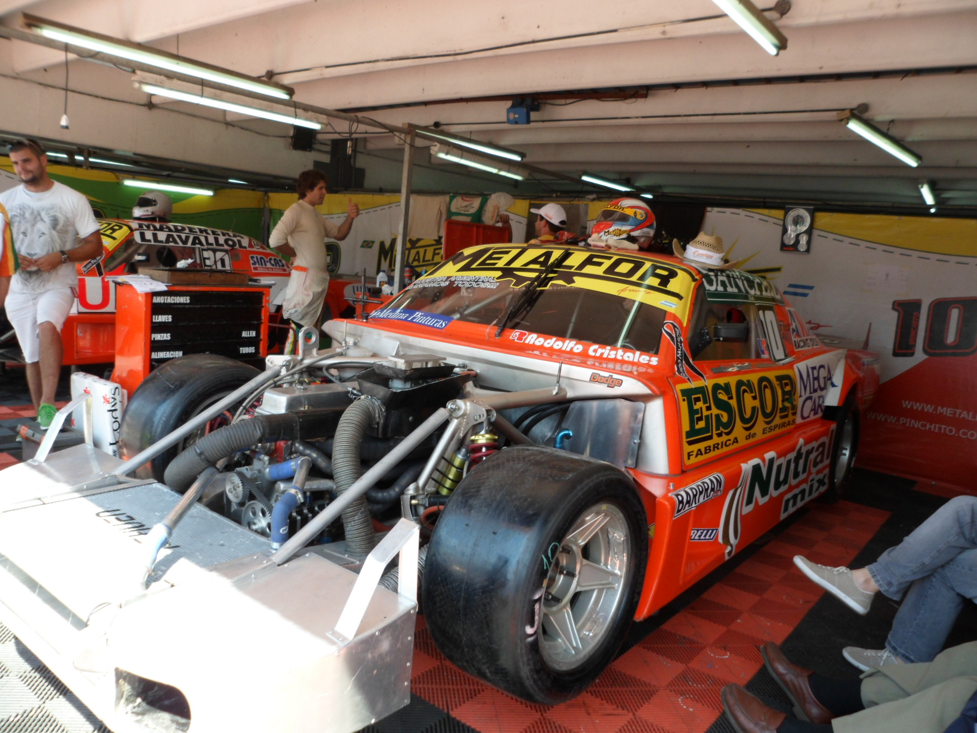 Boxes del equipo de Castellano de TC, se ve en primer plano la Dodge de Tomas Urretavizcaya, y atras la de Pinchito. Es la final de TC diciembre 2011